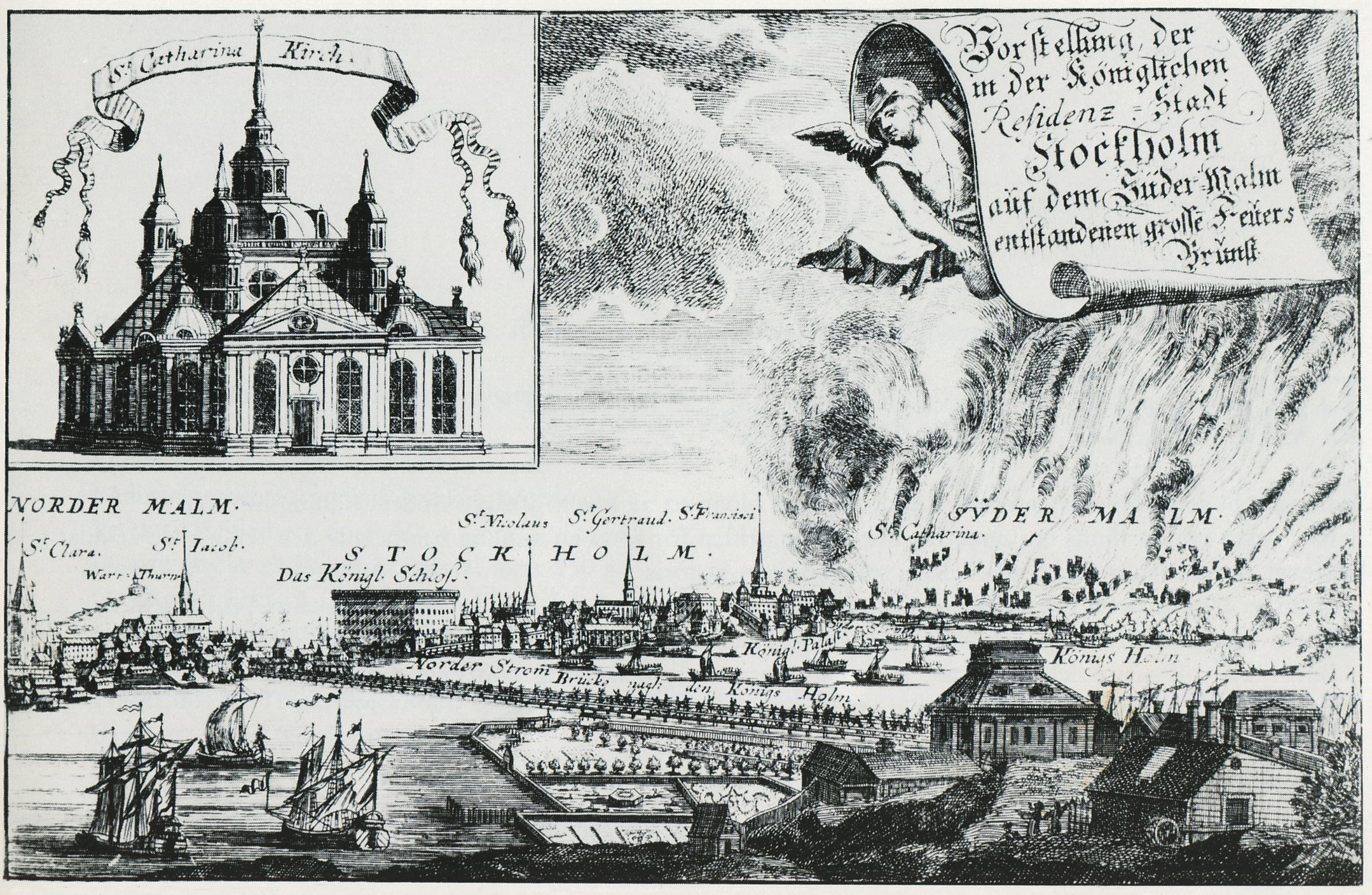 Katarinabranden på Södermalm, Stockholm, 1723, sedd från Kungsholmen. Vorstellung der in der königlichen Residenz=Stadt Stockholm auf dem Süder=Malm entstandenen grosse Feuersbrunst